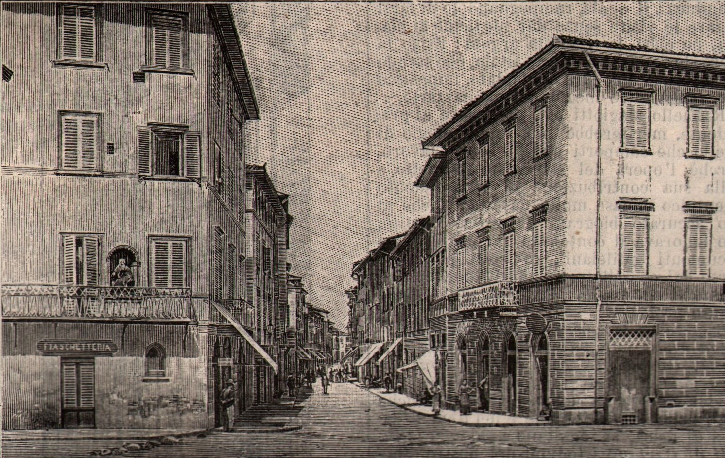 Via Roma